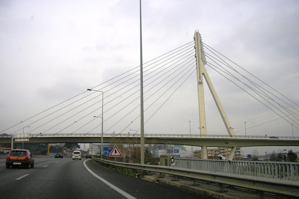 "Viaduto 25 de Abril", over VCI, in Porto, Portugal. Author: Manuel de Sousa.